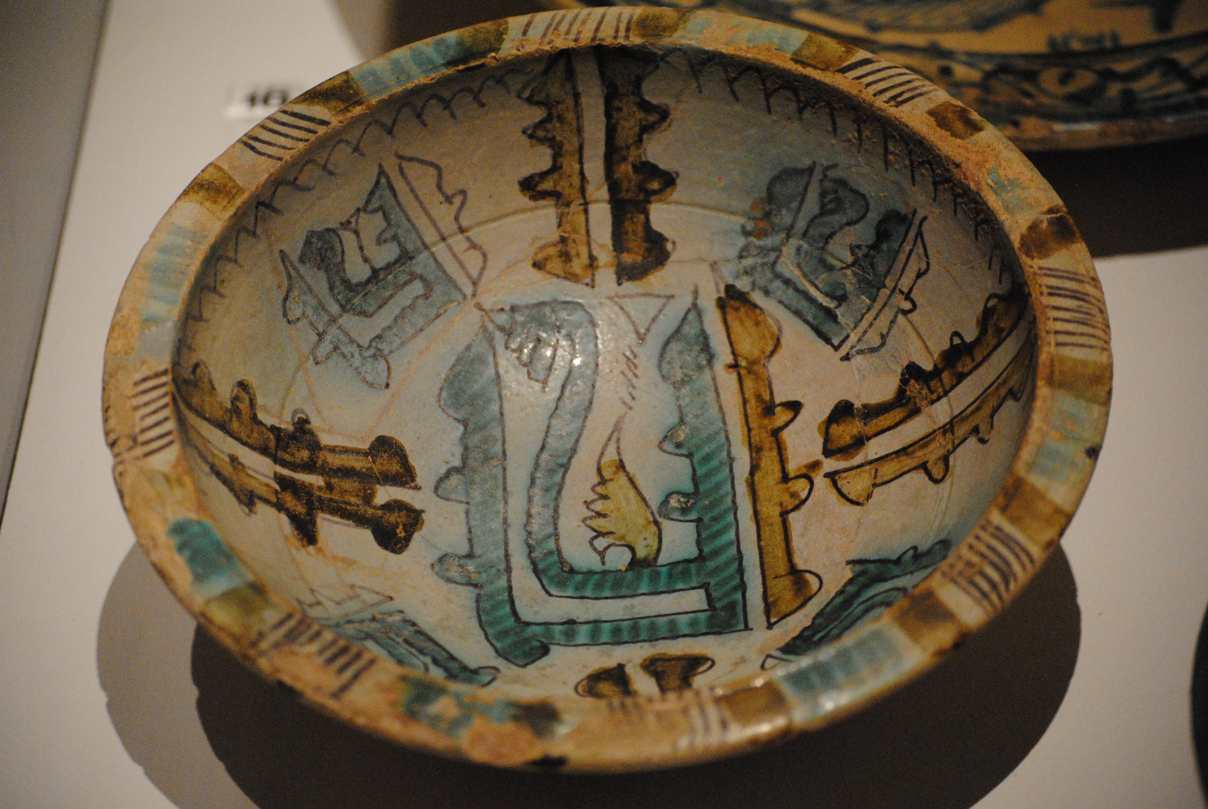 Catino in maiolica (smaltato) policroma usato come bacino ceramico - importato dalla Tunisia nel primo quarto dell'XI secolo (chiesa di San Pieto a Grado, Pisa) - Museo nazionale di San Matteo.